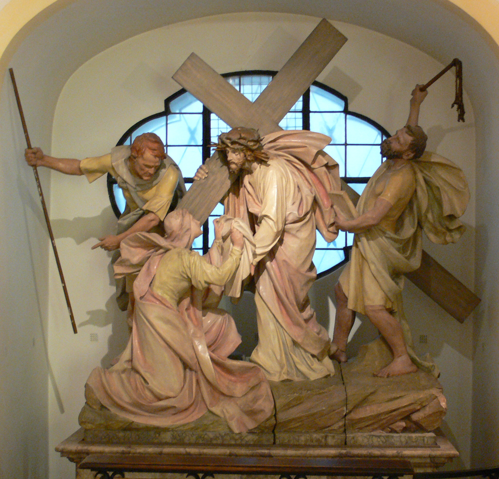 Bürgersaal, München: Kreuzweg in der Unterkirche, Kreuzwegstationen vom Ende des 19. Jh. Schweisstuch der Veronika